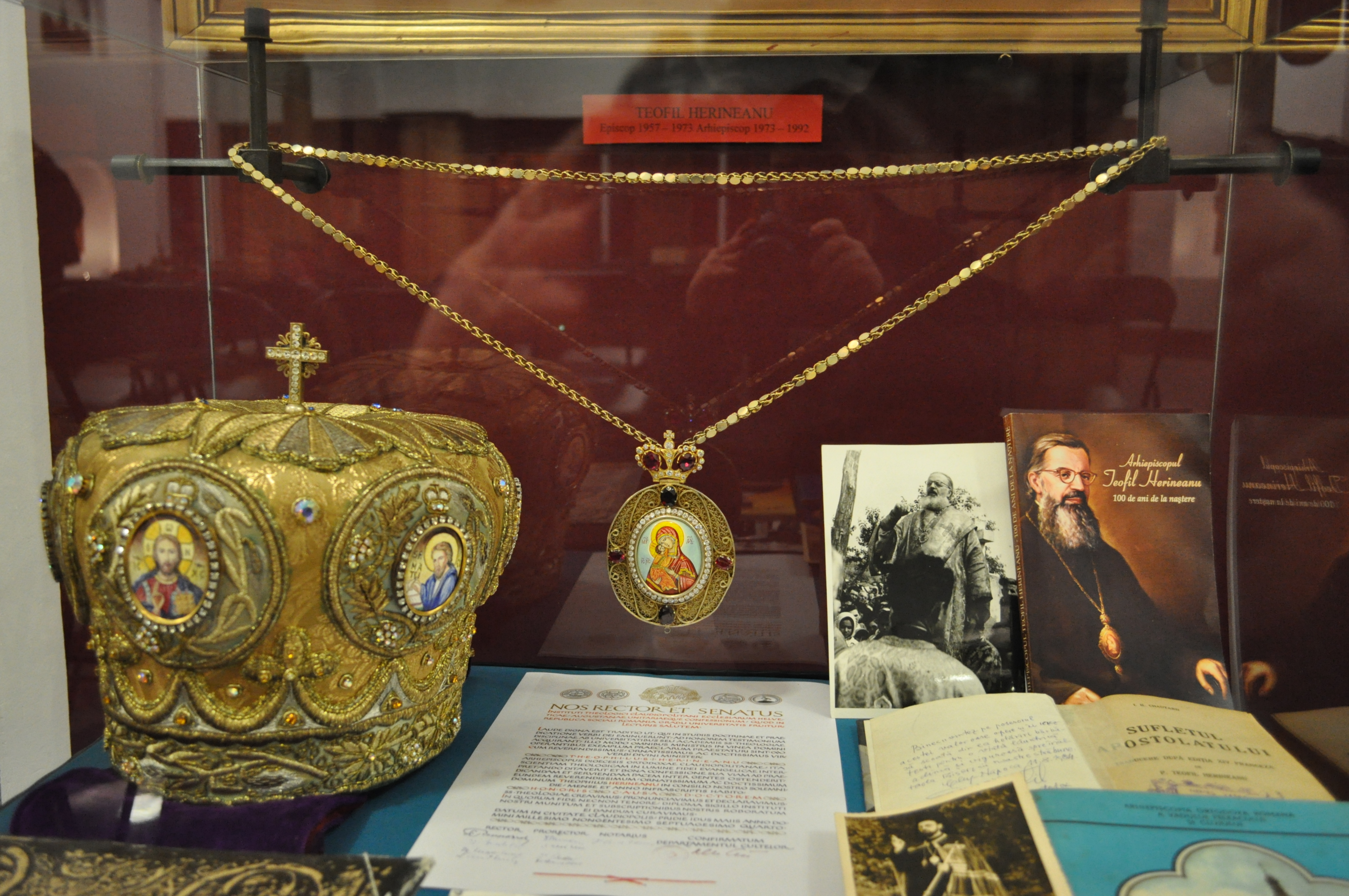 Mitra de arhiereu a arhiepiscopului Teofil Herineanu